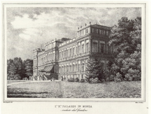 "La villa reale a costruzione ultimata" Today.